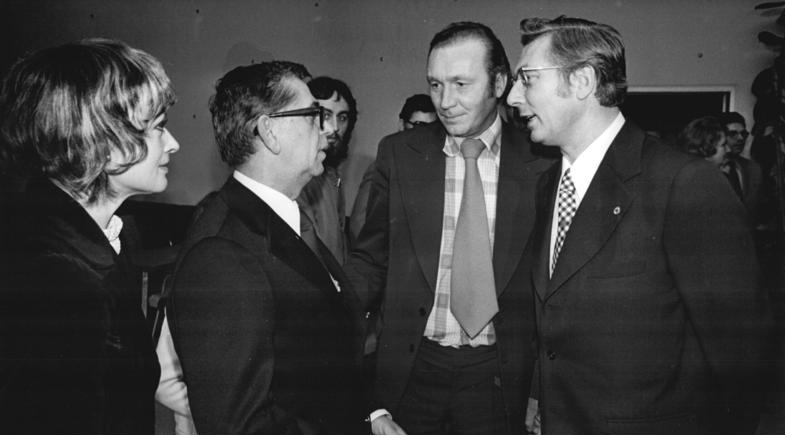 ADN-ZB-Spremberg 17.4.1975 Berlin: Vor der festlichen Kinopremiere des DDR Films "Jakob der Lügner" im Filmtheater "Kosmos" kam es zu einer herzlichen Begegnung zwischen dem Mitglied des Politbüros und Sekretär des ZK der SED Werner Lamberz (2.v.r.) und dem Regiesseur des Filmes Frank Beyer (Mitte) sowie den Darstellern Vlastimil Brodsky und Jana Brejchova.